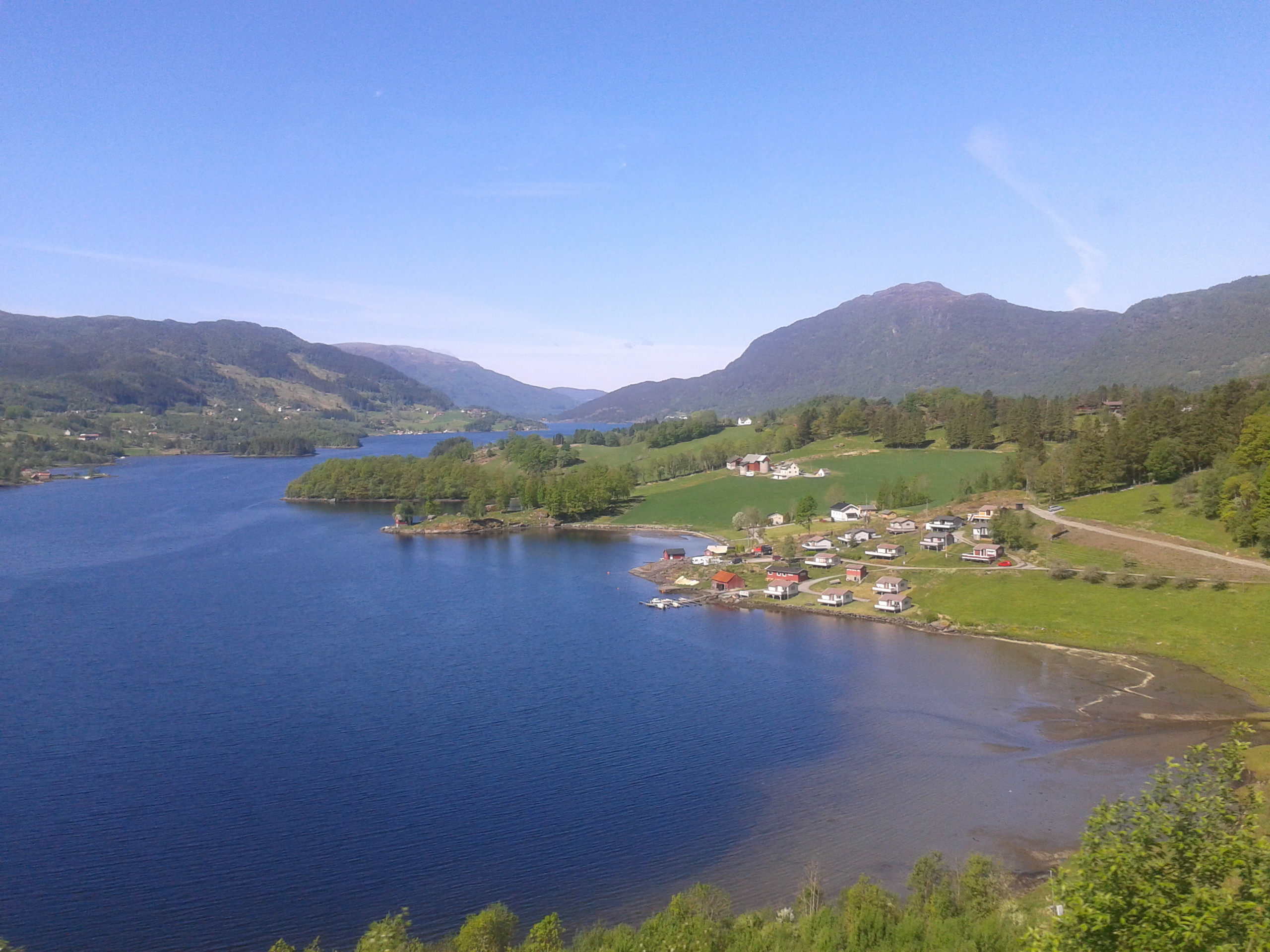 Etne, Norway